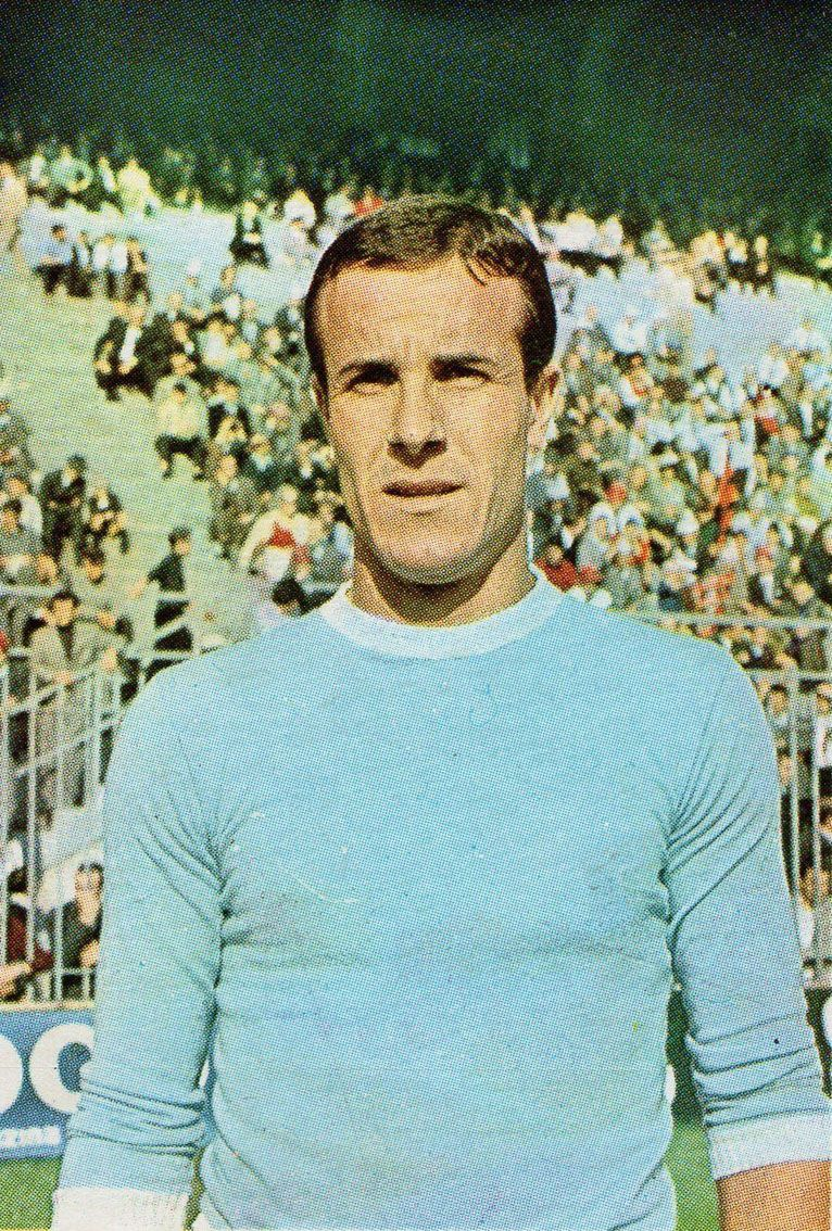 Il calciatore italiano Piero Dotti a metà degli anni 1960.